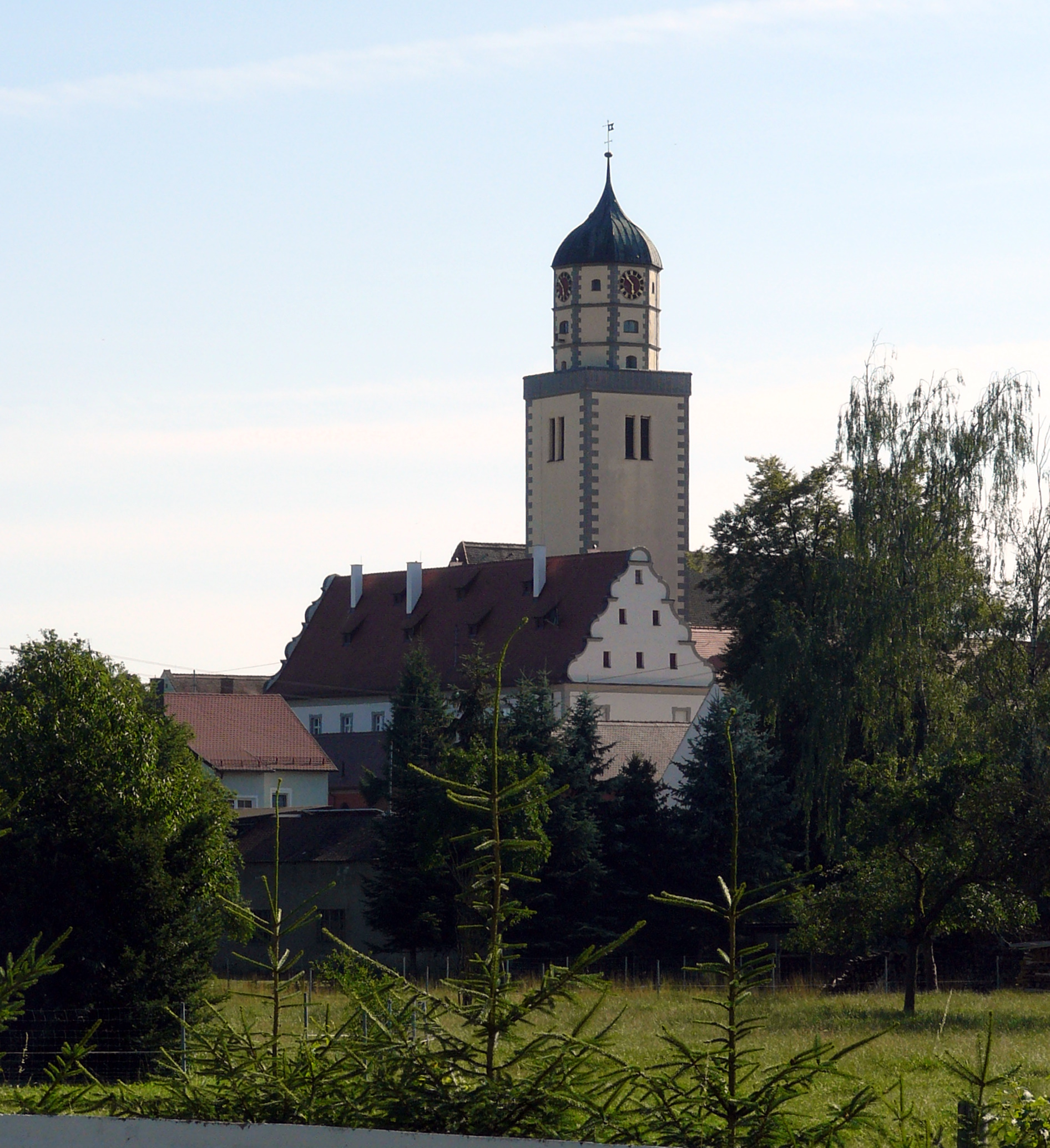 Evangelische St.-Jakob-Kirche in Oettingen in Bayern